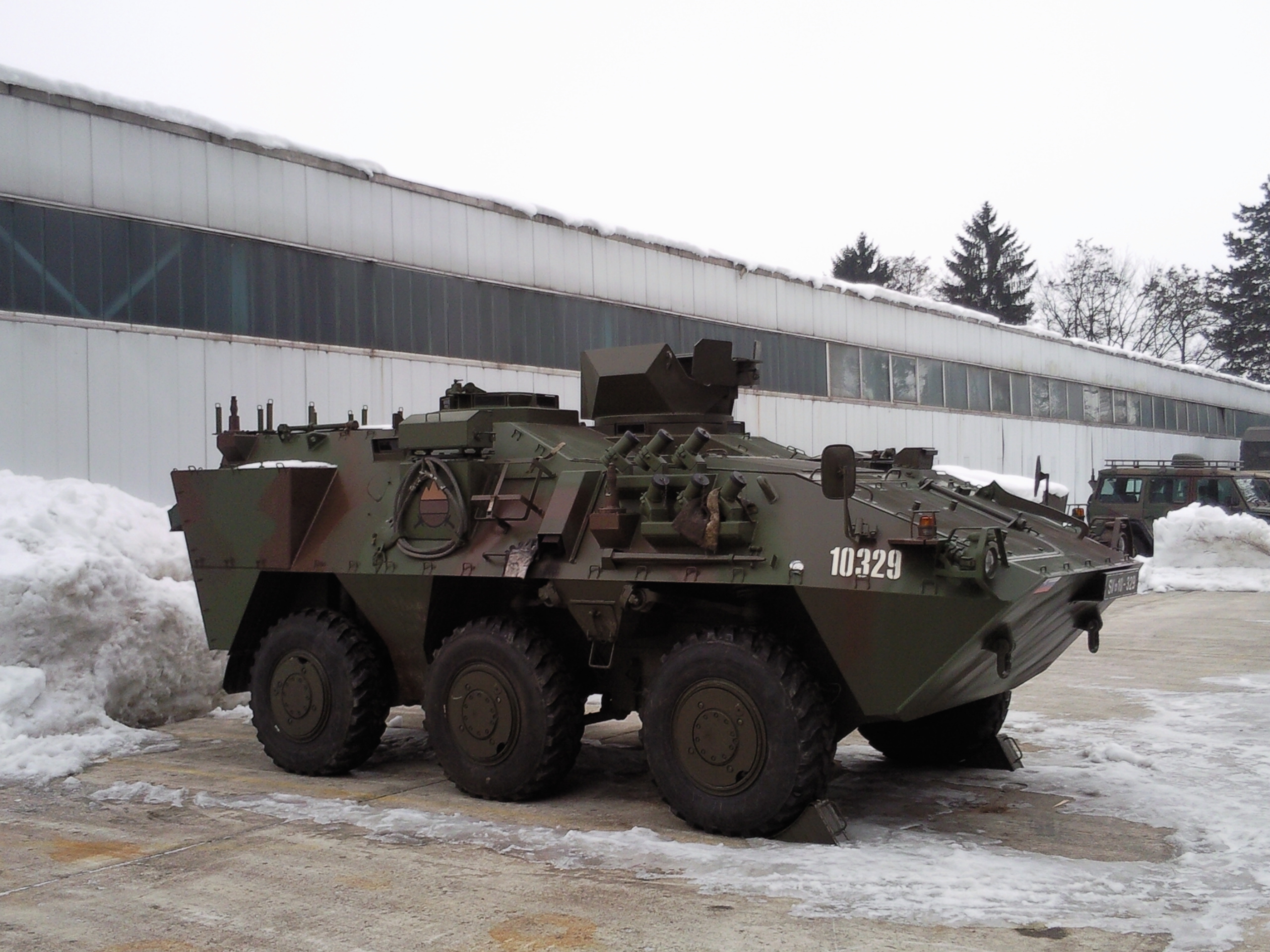 lahko kolesno oklepno vozilo Valuk